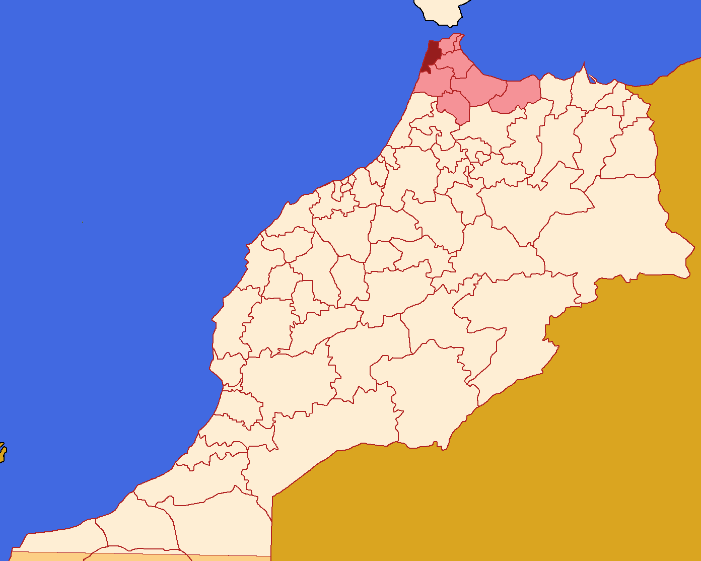 Localização da prefeitura, dentro de Marrocos. Sara Ocidental, não incluído